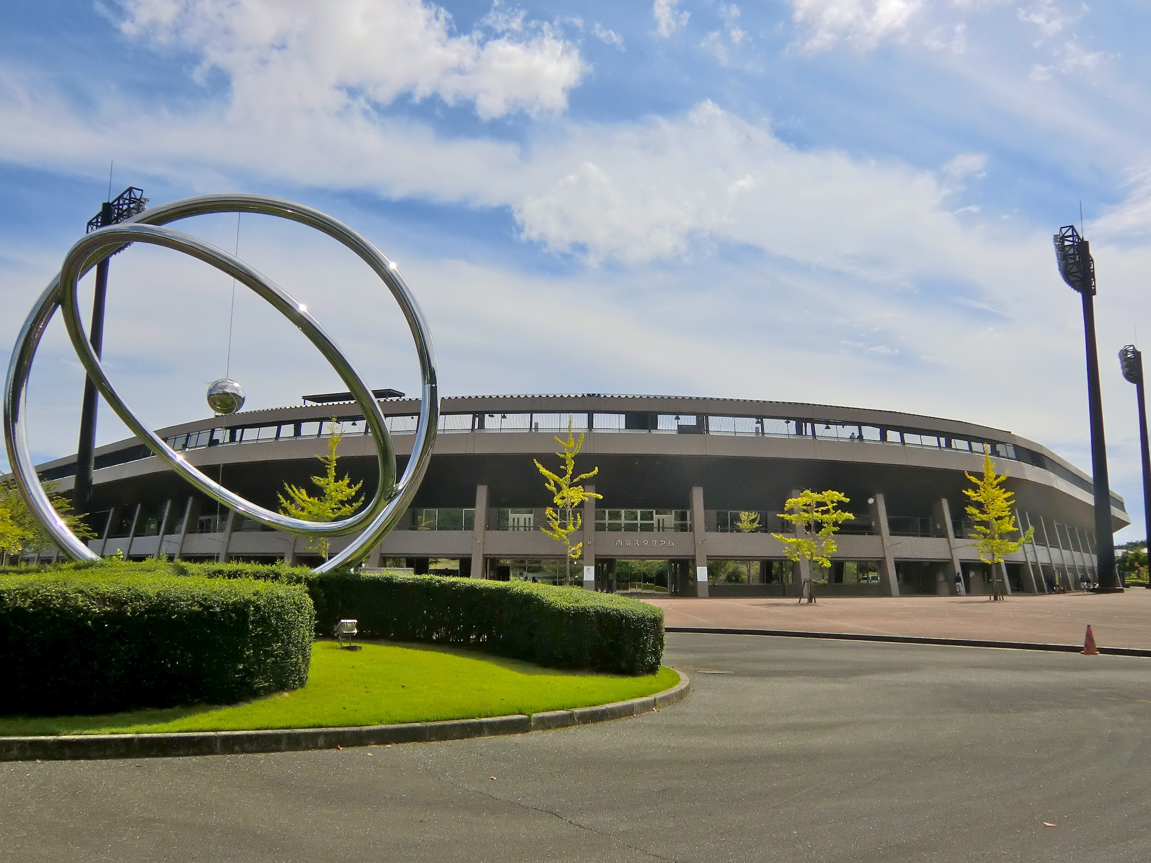 西京スタジアム正面の外観及びモニュメント（山口県山口市）。